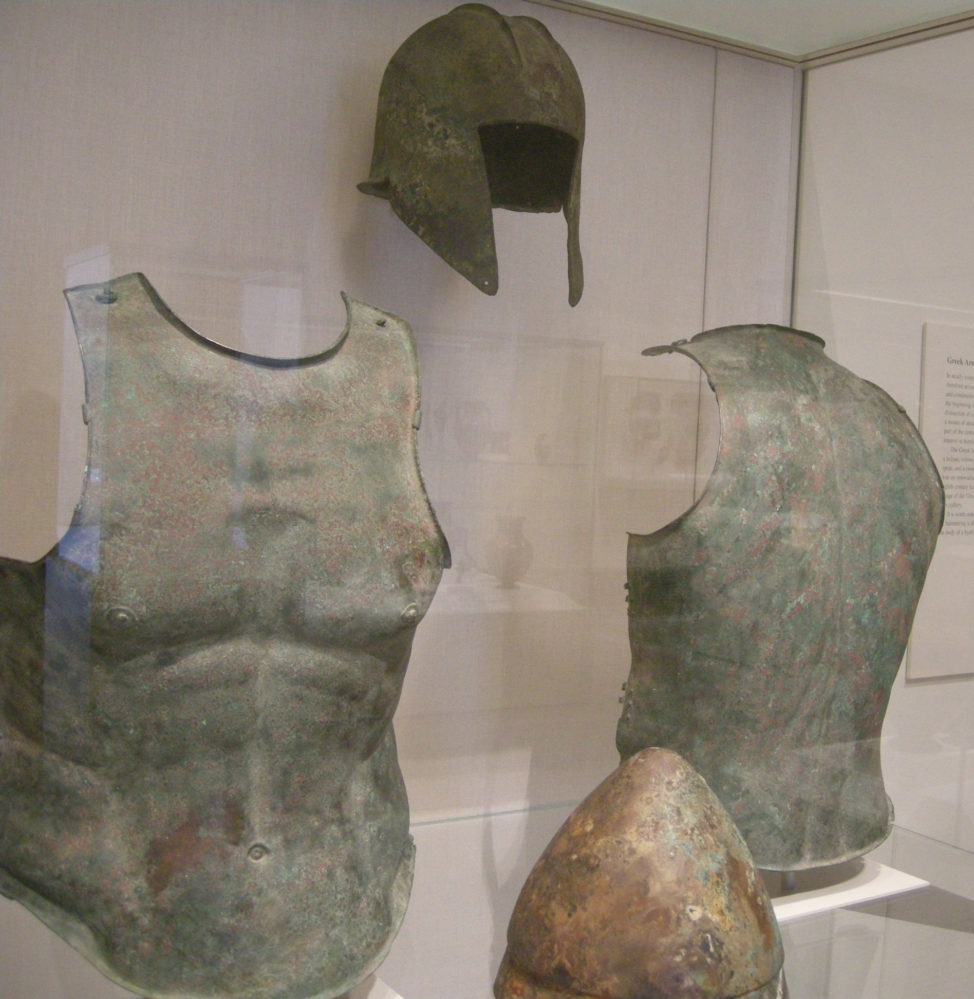 Mett, greek armours